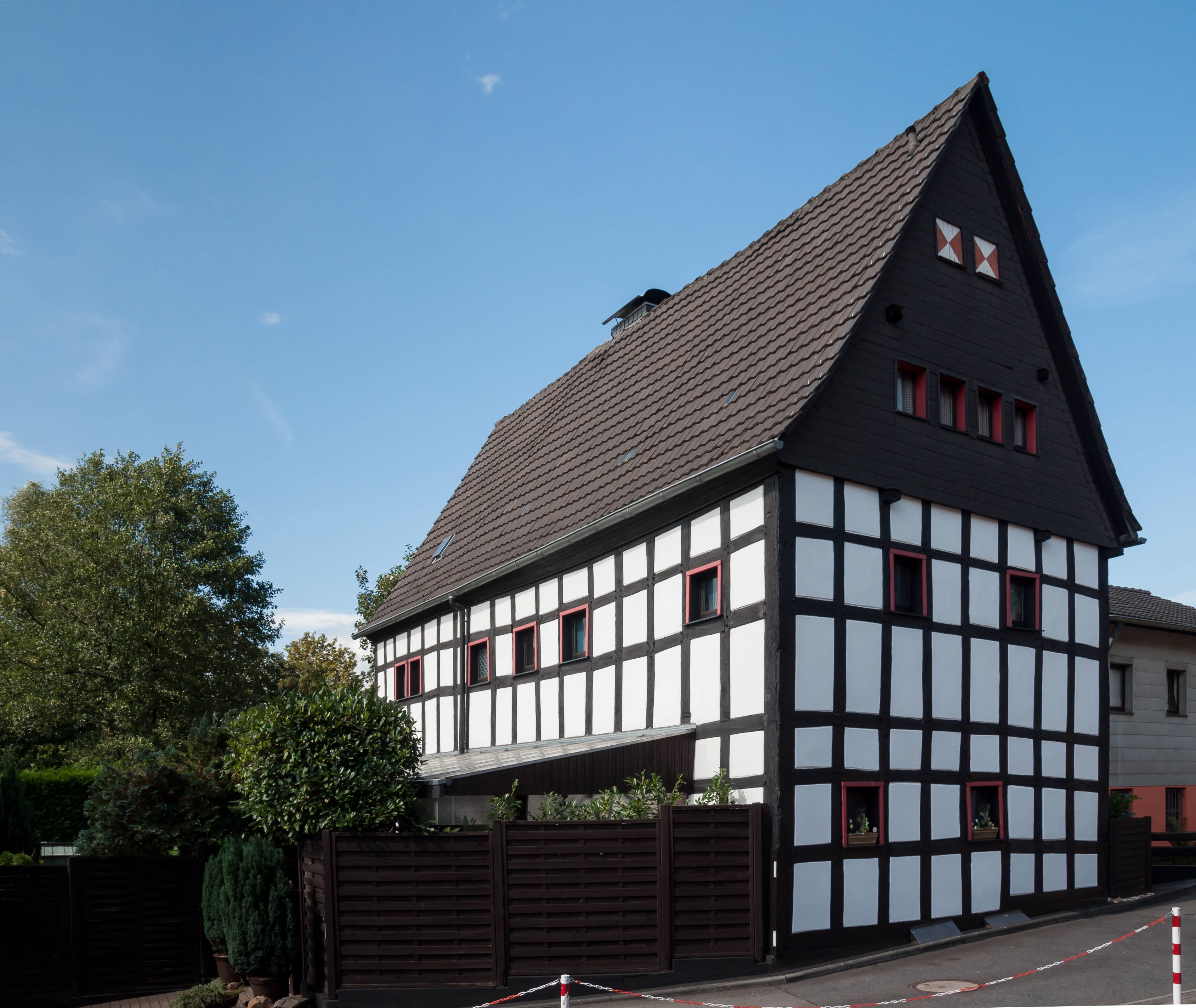 Rösrath, Denkmalnummer 47, Steeg 5 (Haus Steeg)